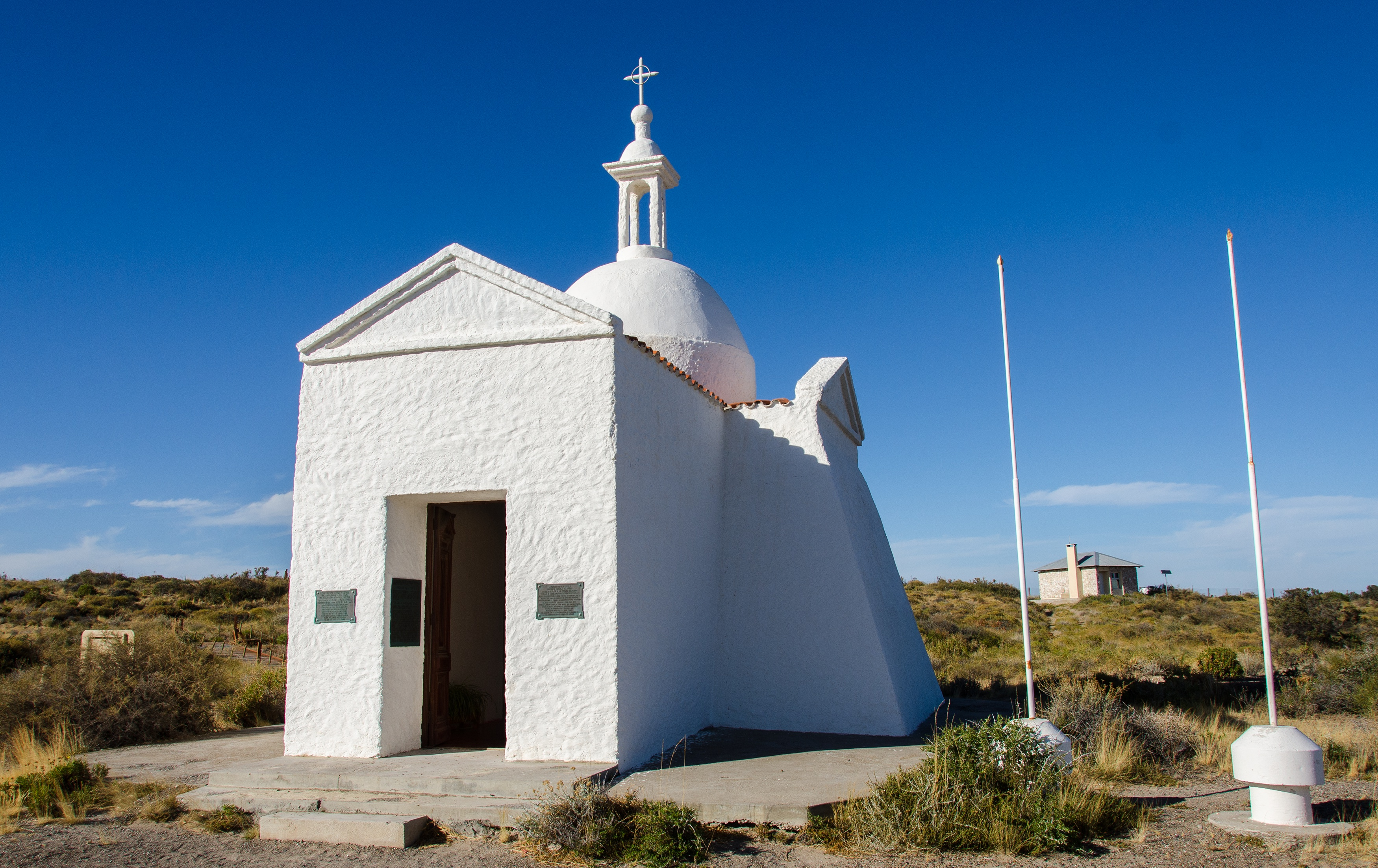 El 7 de enero de 1779 desembarcó la expedición de Don Juan de la Piedra en el Golfo de San José, posteriormente se construyo un fuerte y una capilla, cuya replica se puede ver en esta foto. La misma fue destruida por un malón aborigen el 7 de agosto de 1810.